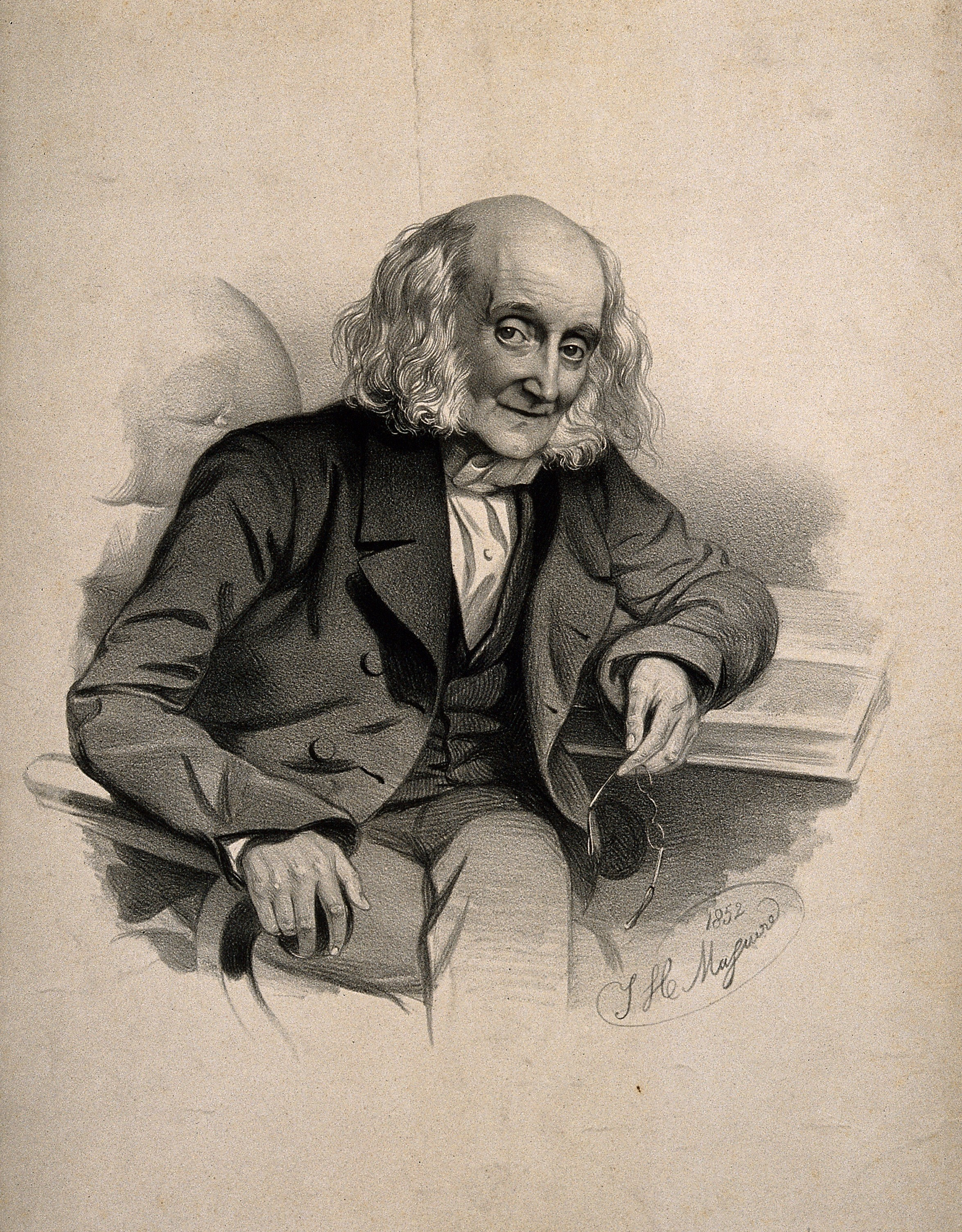 Genre/Technique: Portrait prints. Lithographs. Subject name: Coleman, James, 1941